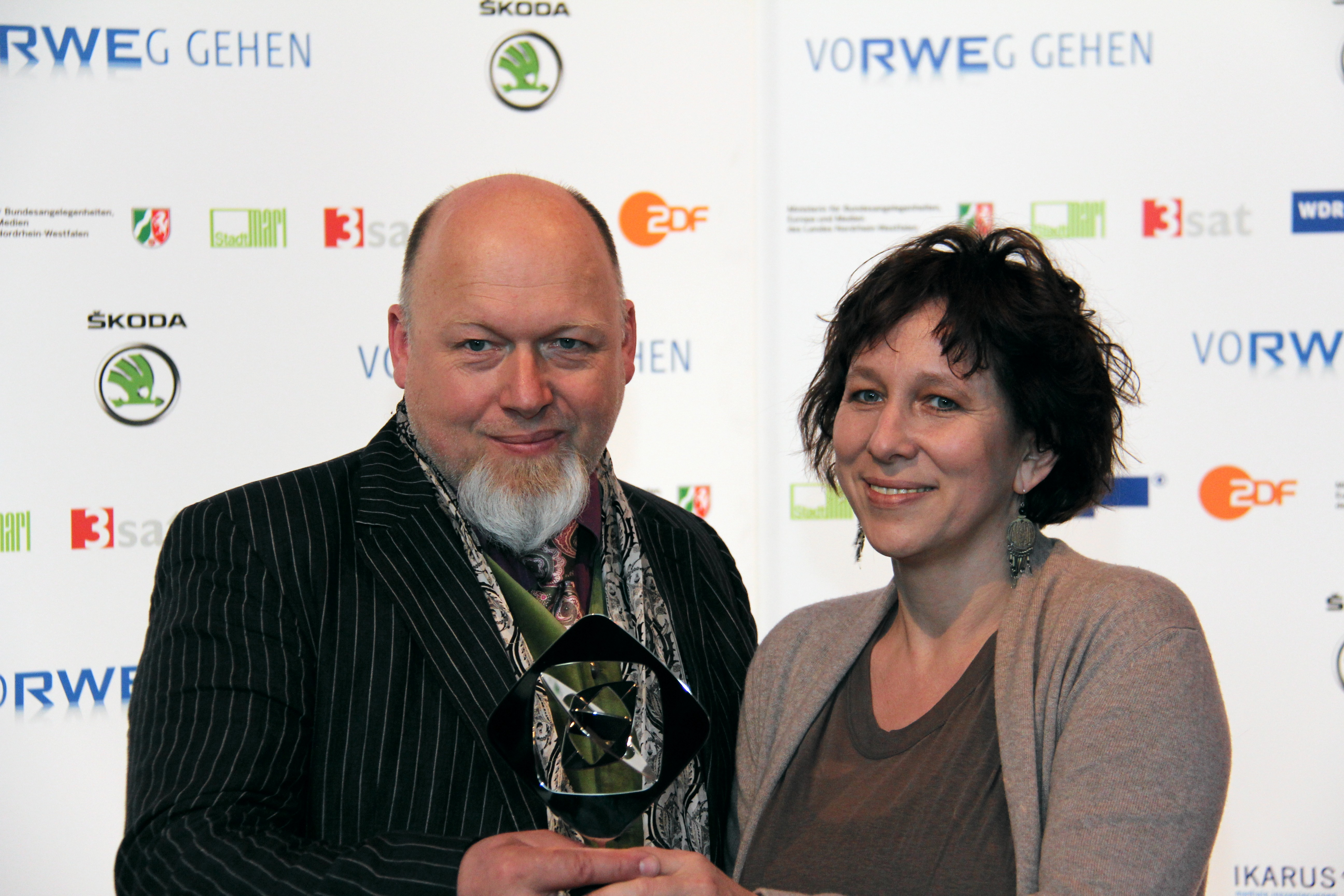 Grimme-Preisträger Rainer Kaufmann und Ariela Bogenberger bei der Verleihung 2011